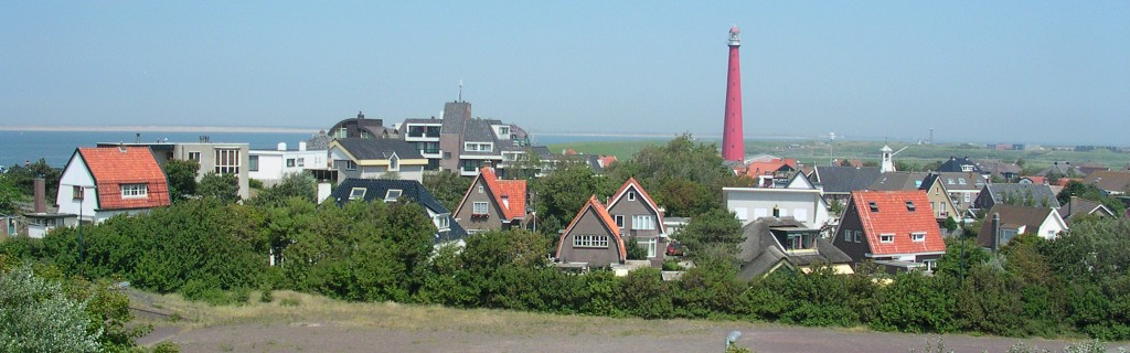 Kijk op het op het dorp Huisduinen Wide view of the village Huisduinen